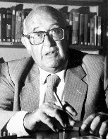 Jorge Enea Spilimbergo